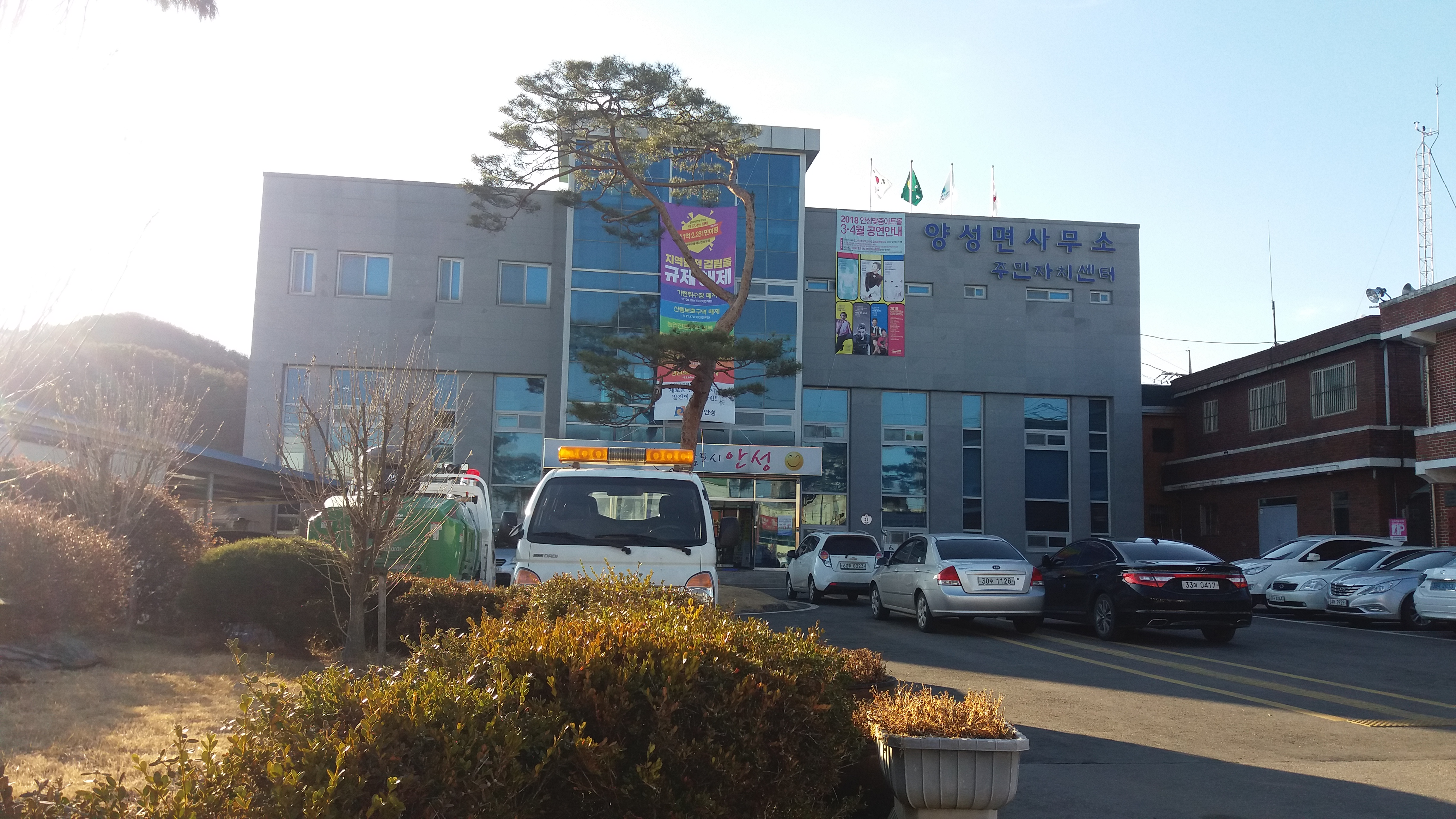 양성면사무소